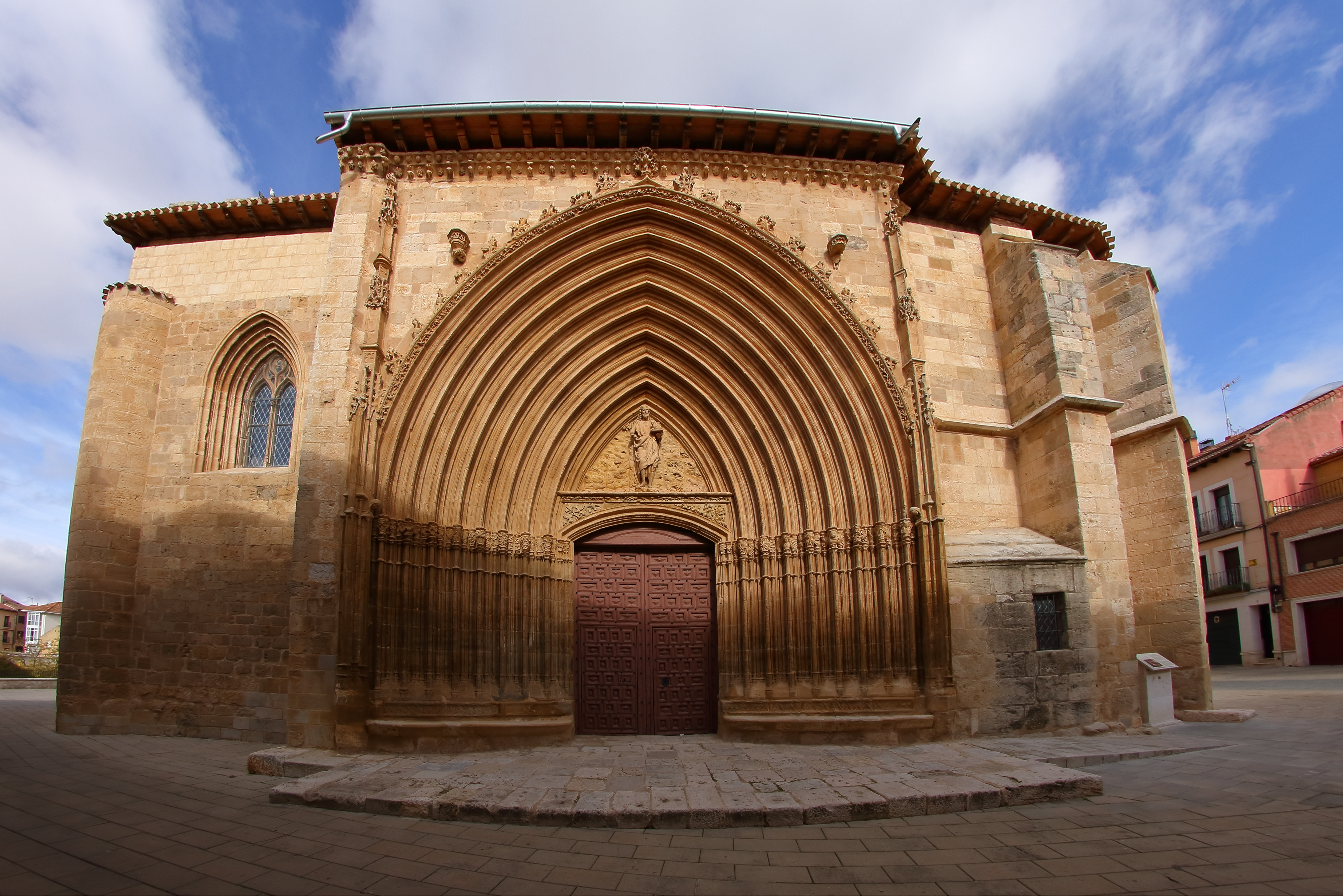 Iglesia de San Juan Bautista, Aranda de Duero, fachada pricipal